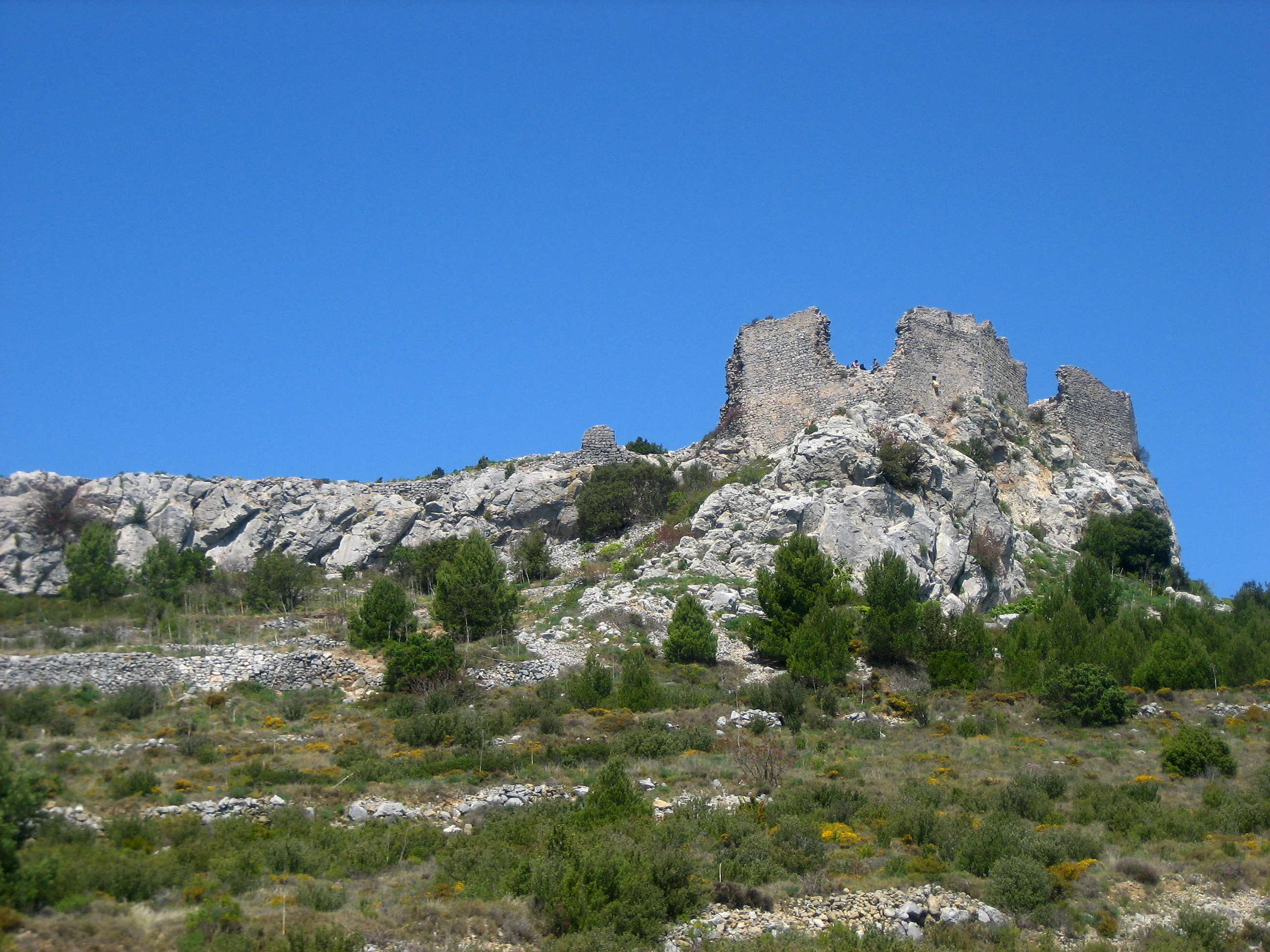 the beautiful ruins of château de Salvaterre / restes del castelld e Salvaterra, o d'Òpol (els dos noms del poble rossellonès)